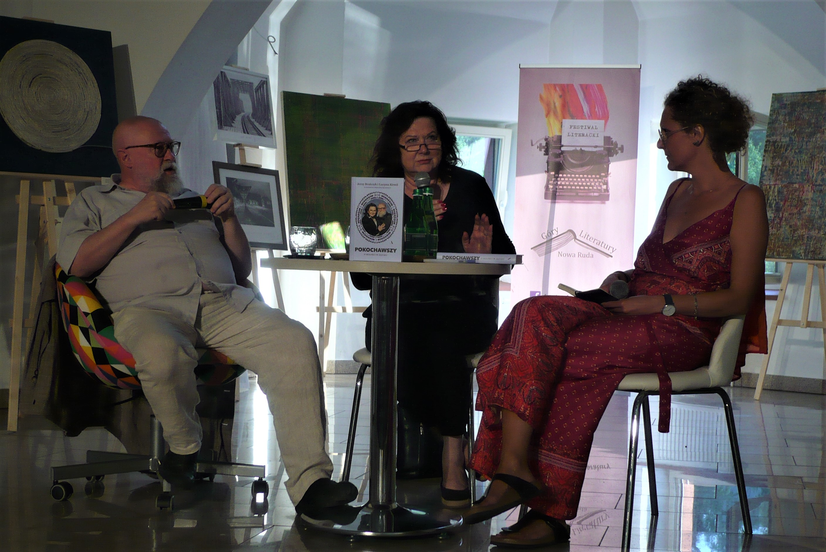 Jerzy Bralczyk, Lucyna Kirwil i Justyna Czechowska, Festiwal Góry Literatury, 2018